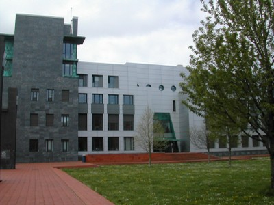 donostiako enpresaritza eskola